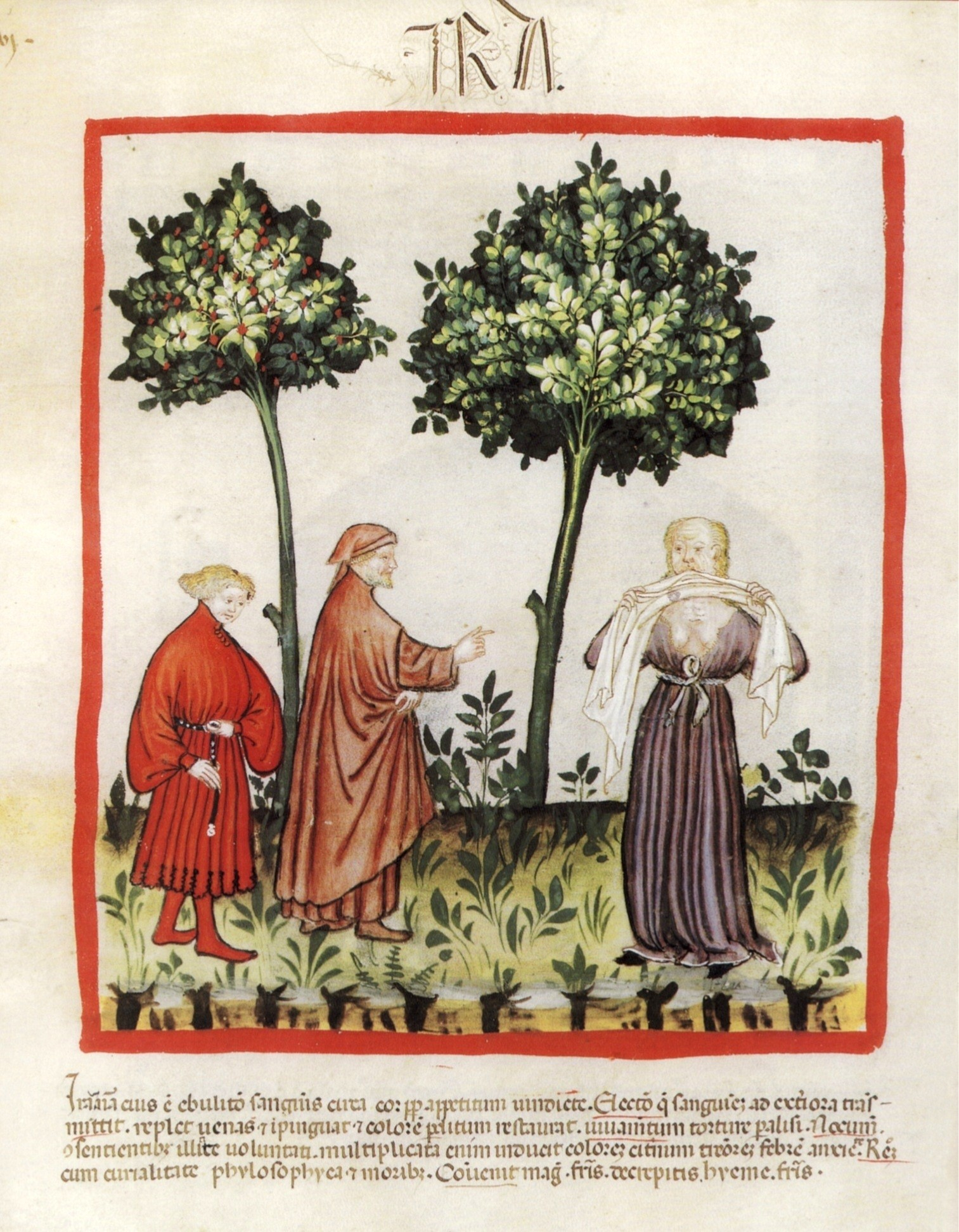 Miniatur aus dem Kodex Tacuinum Sanitatis (Vindob. Ser. n. 2644). Eine Illustration zu einem Text über „Zorn“ des orientalischen Arztes Ibn Botlan.